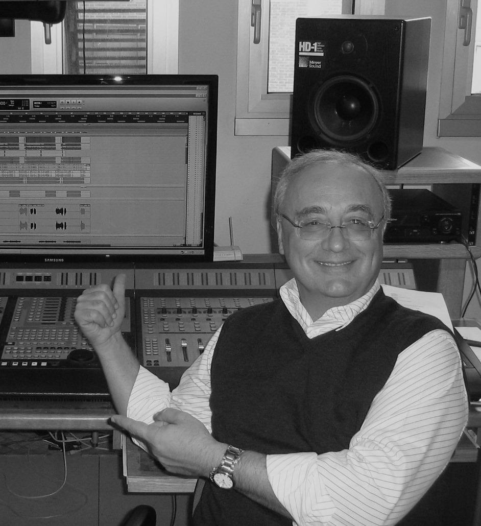 Gian Marco Gualandi in Studio di Registrazione